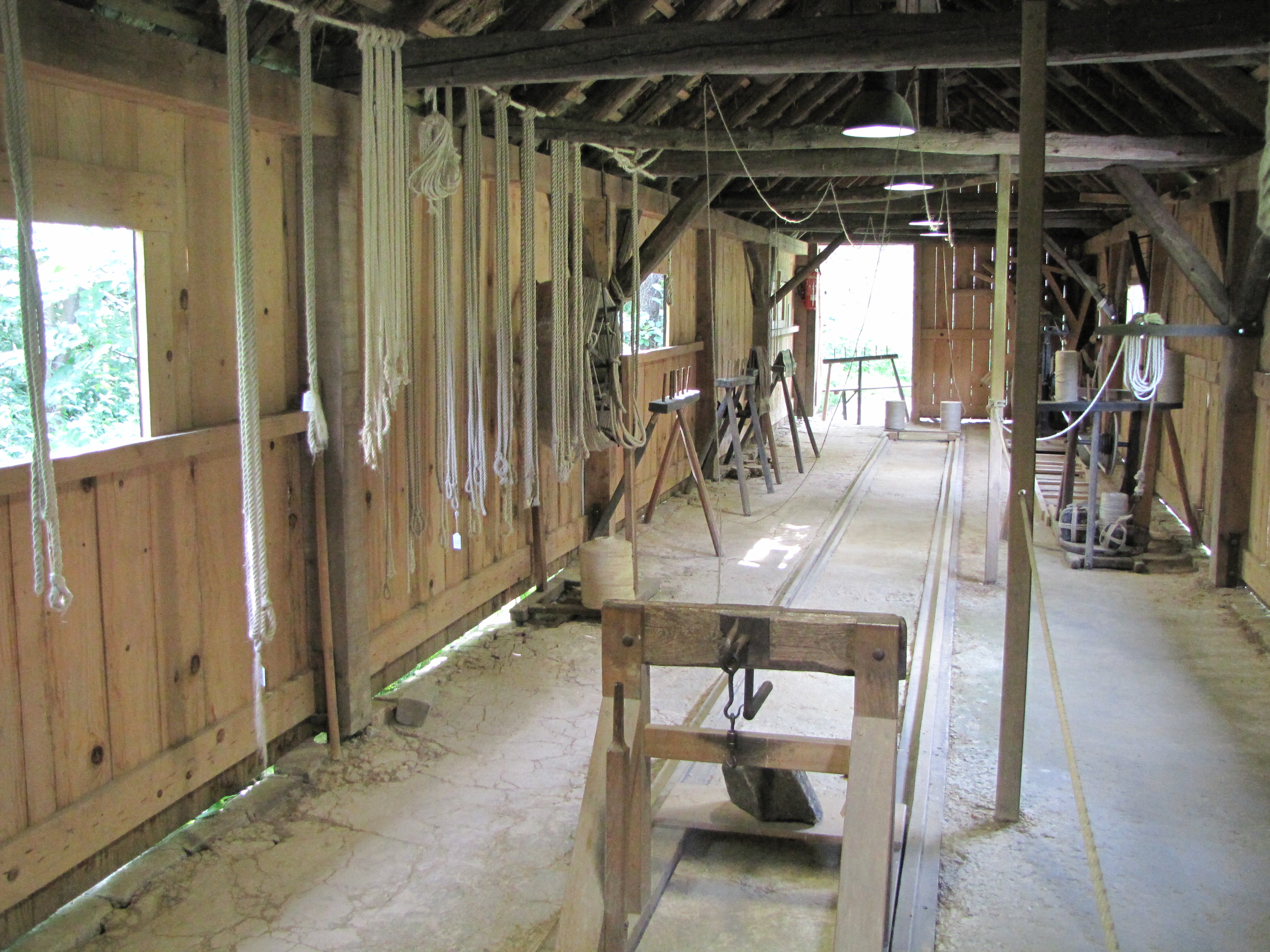 Bergisches Freilichtmuseum Lindlar. Seilerei.